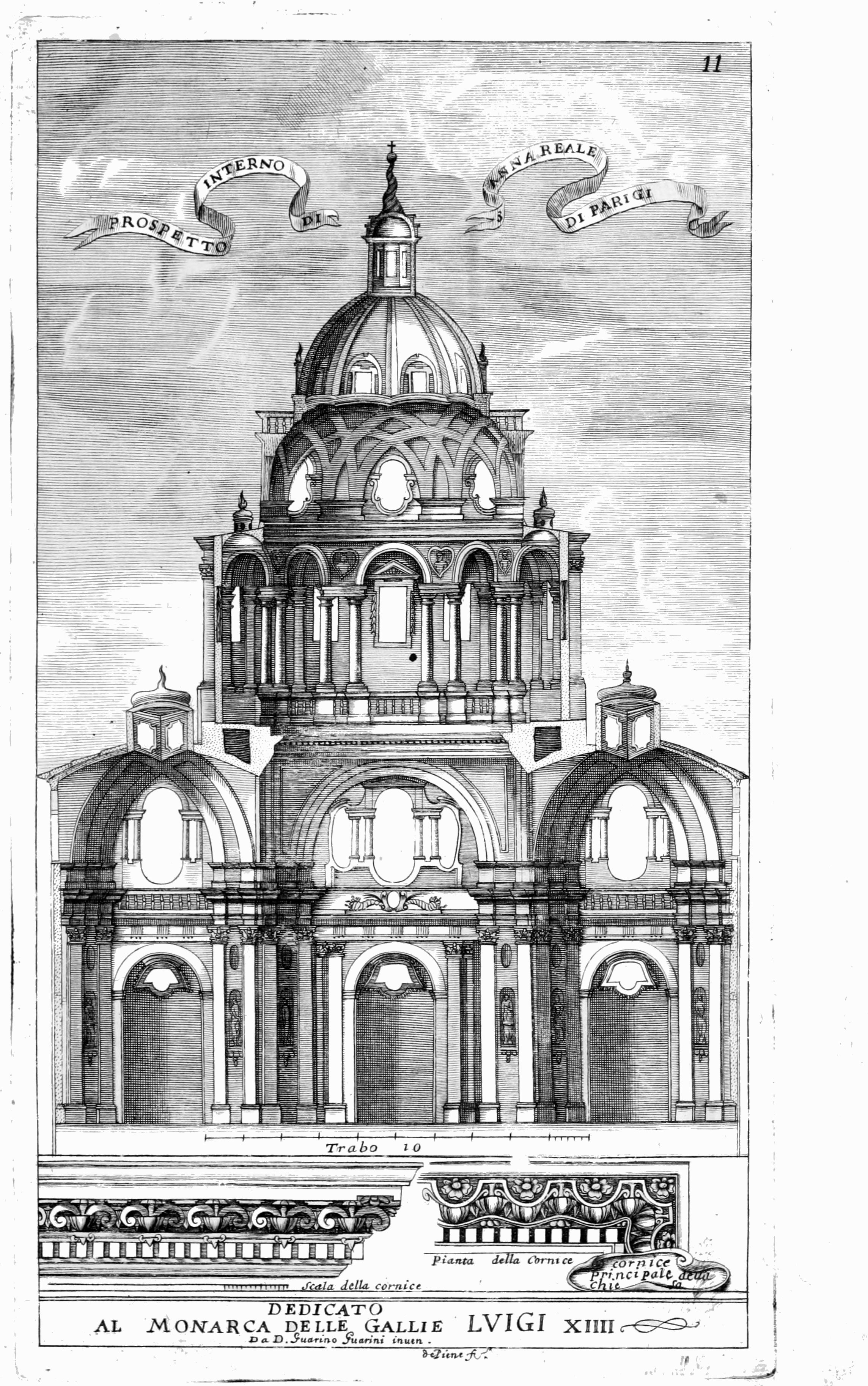 Prospetto interno di sant'Anna Reale di Parigi